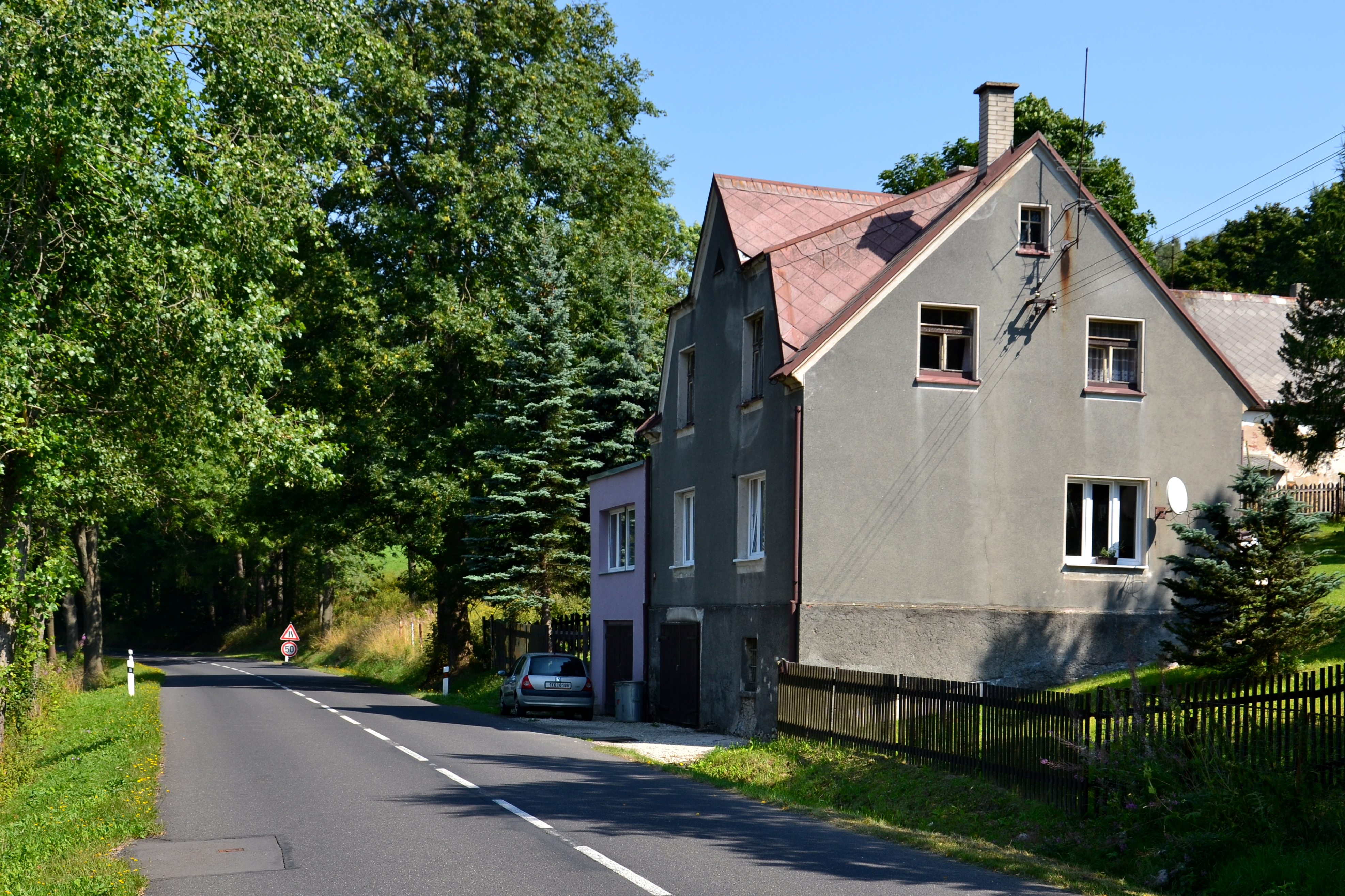 Výsada